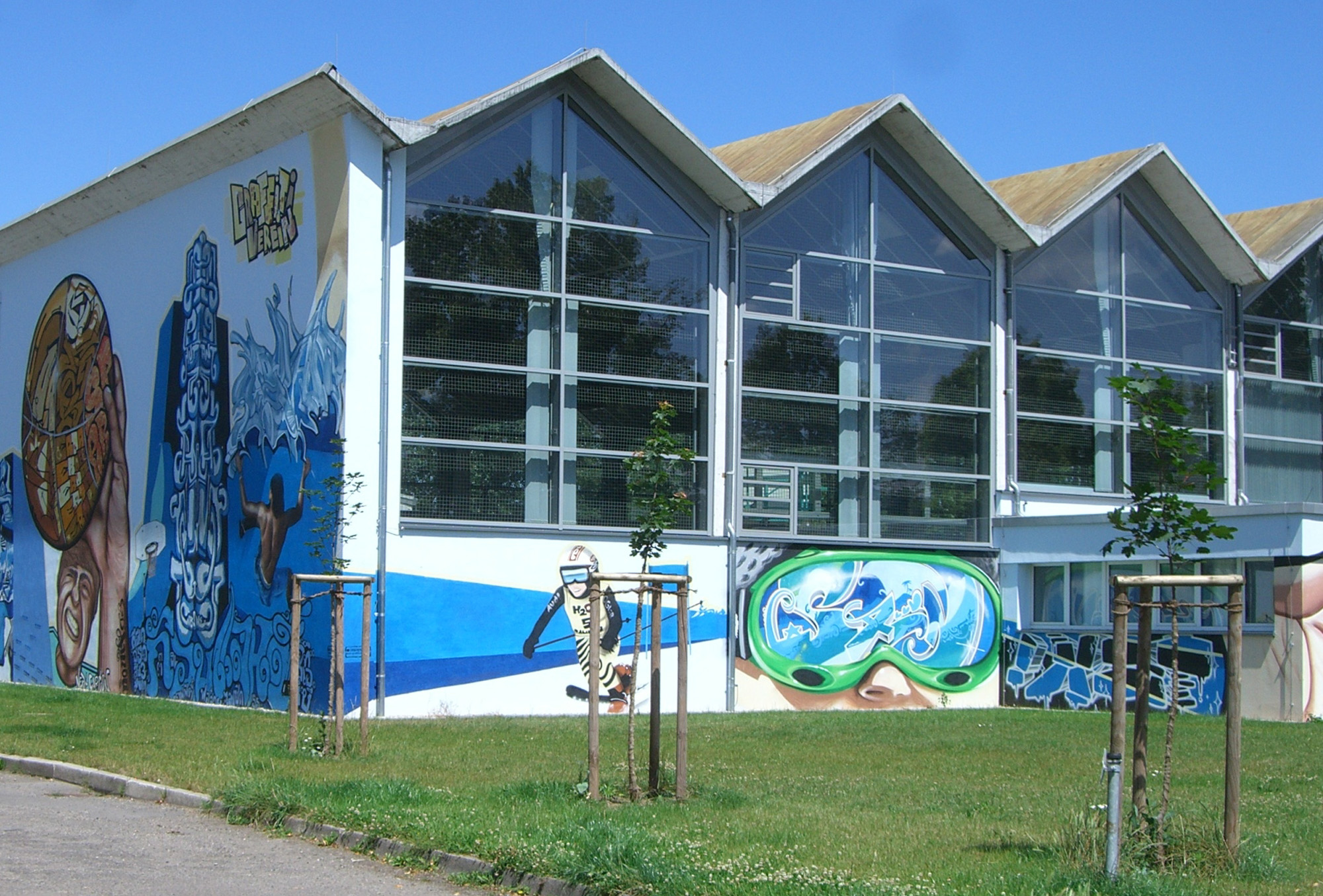 Sporthalle der HTWK Leipzig in der Arno-Nitzsche-Straße. - Erbaut 1970, Zustand 2009